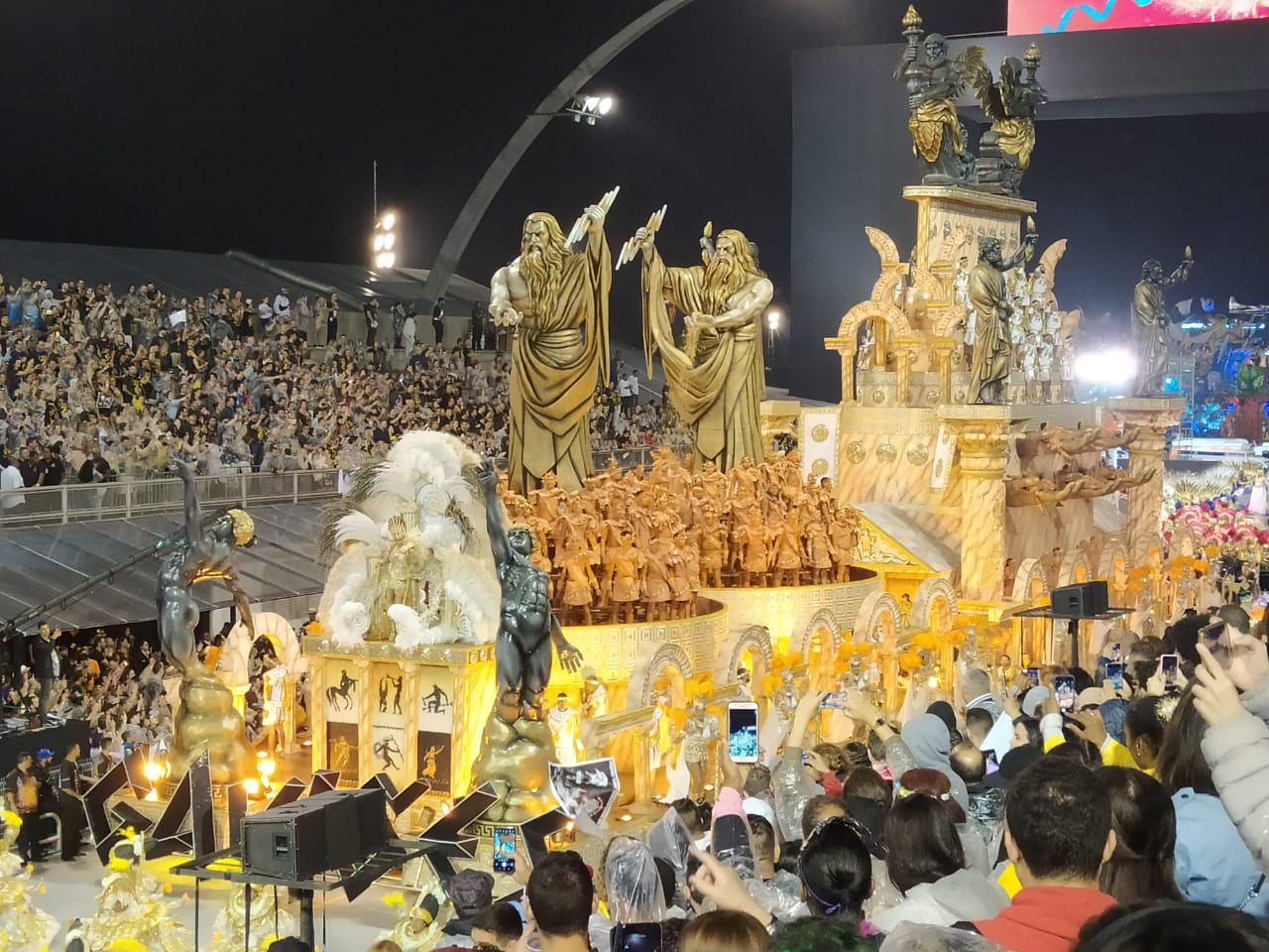 GRCES Gaviões da Fiel Torcida